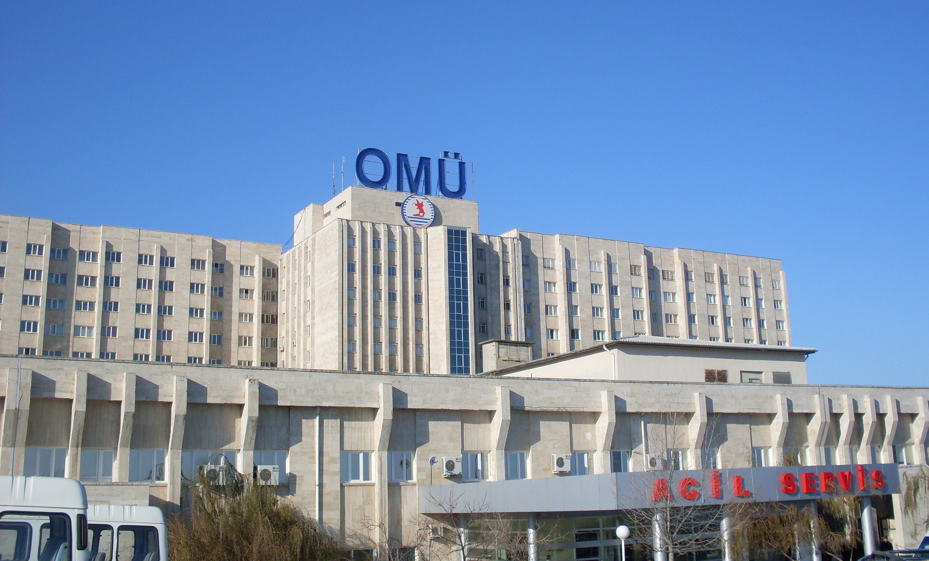 Ondokuz Mayıs Üniversitesi Tıp Fakültesi Hastanesi